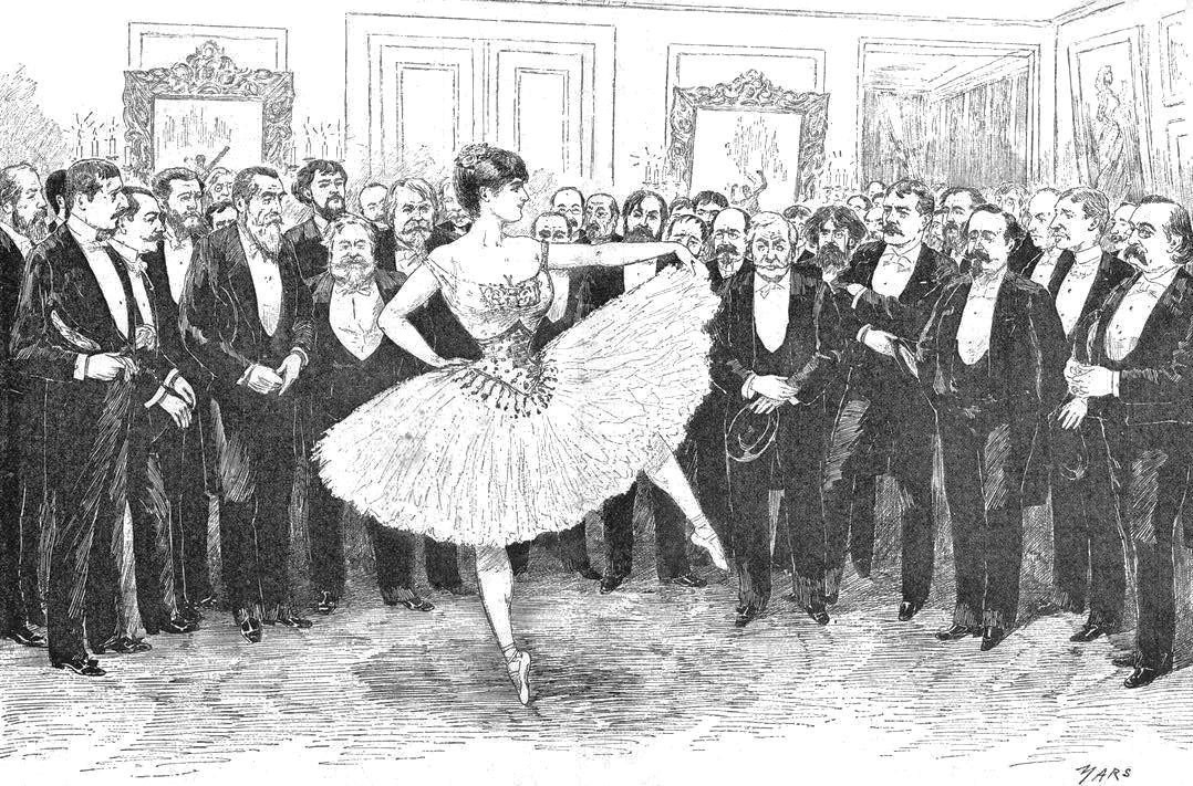 "Le Cinquantenaire du Charivari chez M. Pierre Véron. - Mlle Julia Subra dans la leçon de danse du "Fandango". (Croquis de M. Mars). Portraits de quelques-uns des assistants, dans l'ordre du dessin : MM. Paul Déroulède, Andrieux, Pailleron, Louis Leroy, Harpignies, Duez, Jundt, général Pittié, Grévin, Eug. Labiche, Altaroche, Léo Delibes, Aug. Vitu, Gondinet, Ferdinand de Lesseps, Alphonse Daudet, Guillemet, Lansyer, Pierre Véron, de Marcère, Detaille, Maxime Lalanne, Henri de la Pommeraye, etc., etc."